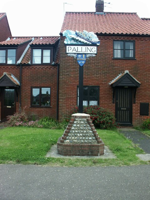 Village sign, Sea Palling